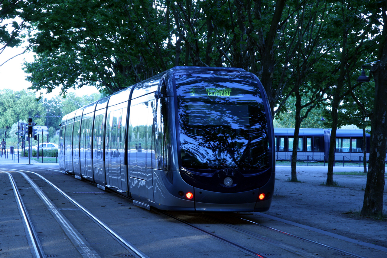 Tramway à Bordeaux